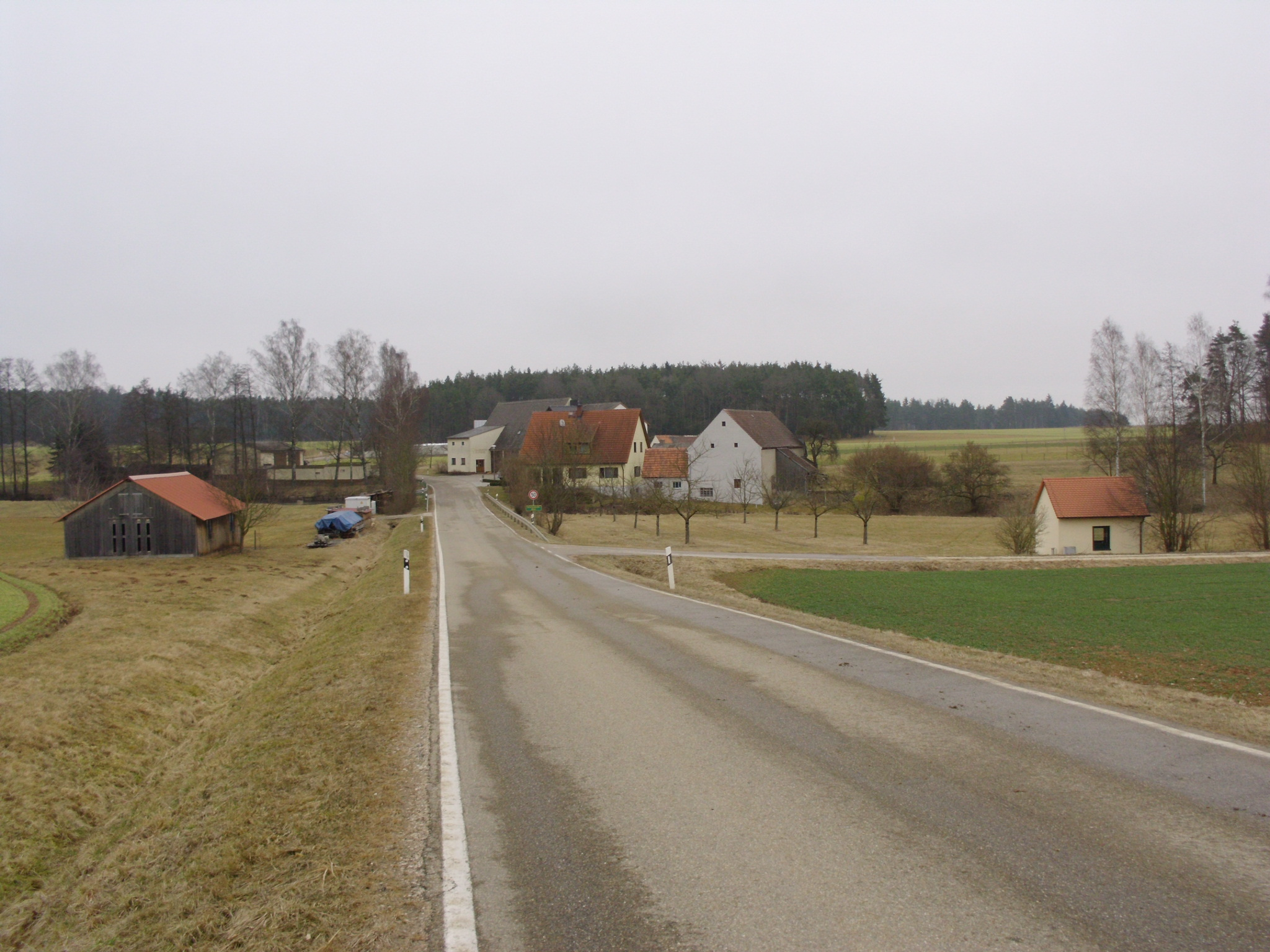 Unterhambacher Mühle bei Unterhambach, Ortsteil von Gunzenhausen im mittelfränkischen Landkreis Weißenburg-Gunzenhausen, Bayern.